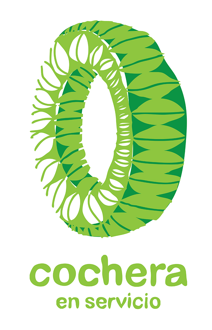 Cochera en servicio es una iniciativa comunal de Gabriela León.